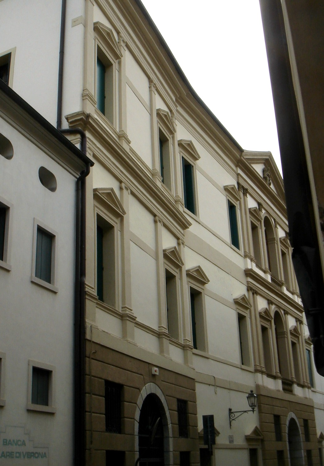 Conegliano (Treviso): Palazzo Montalban nuovo (XVIII sec.), facciata sulla Contrada Granda.